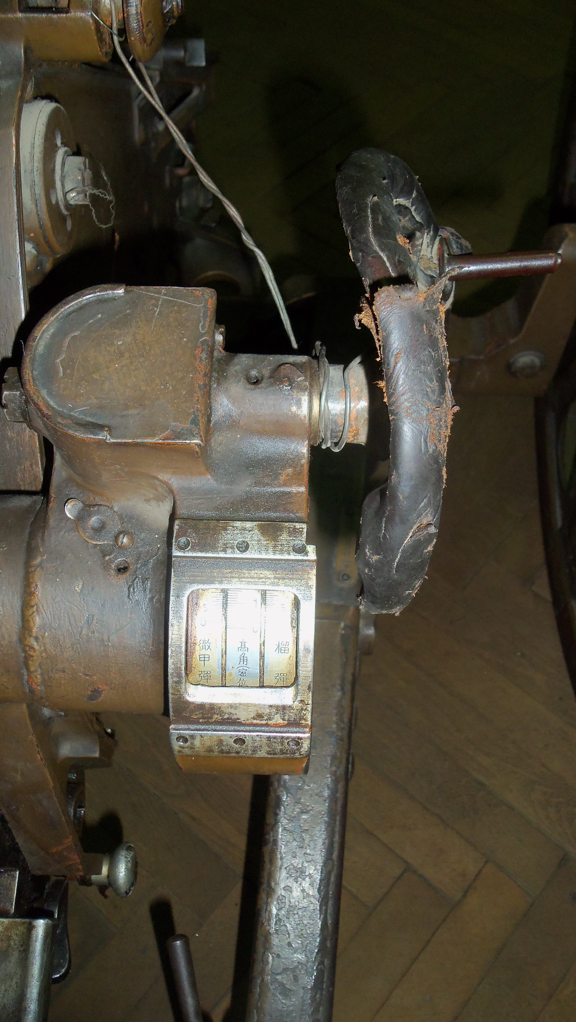 37-мм японская противотанковая пушка обр. 1934 года (2594 год от основания Японии) в Военно-историческом музее артиллерии, инженерных войск и войск связи в Санкт-Петербурге